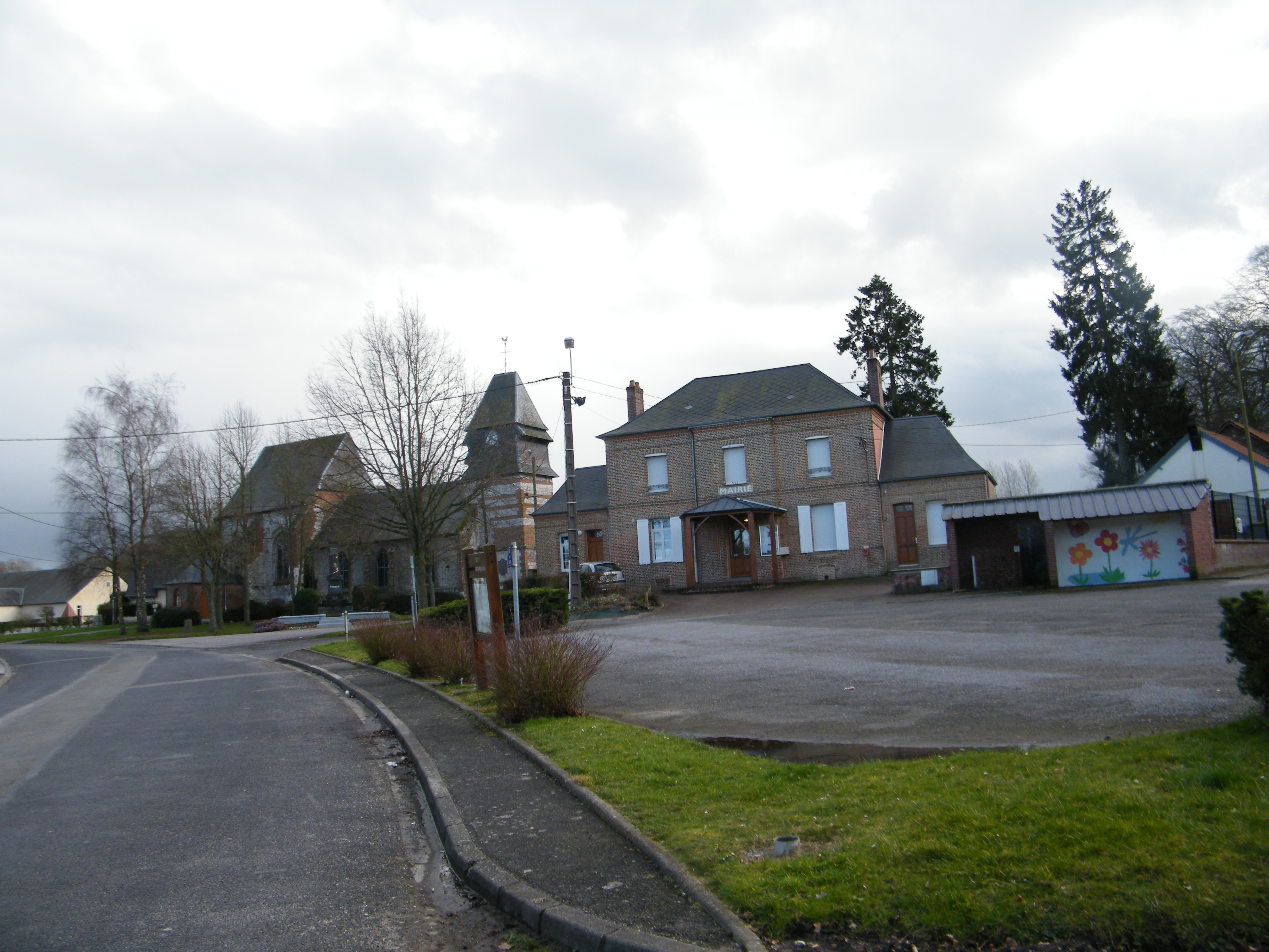 La mairie et l'église.